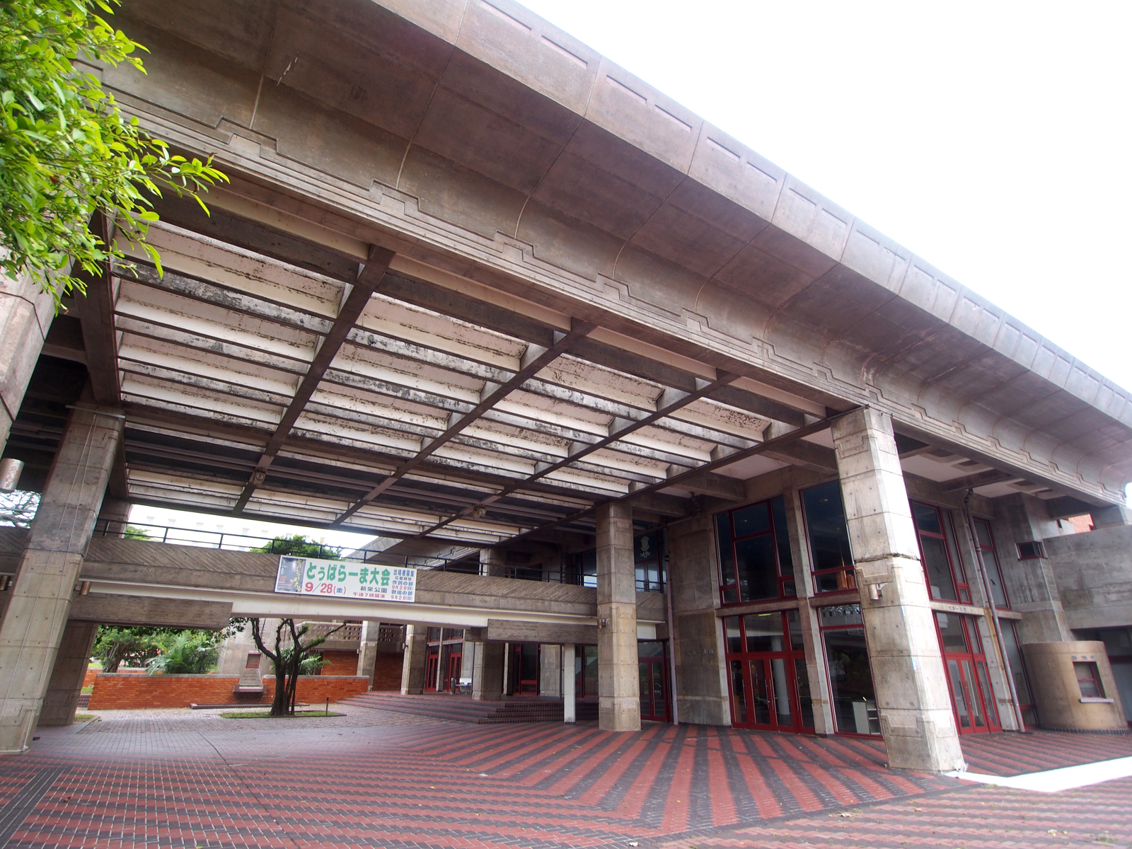 石垣市民会館（沖縄県石垣市石垣島）